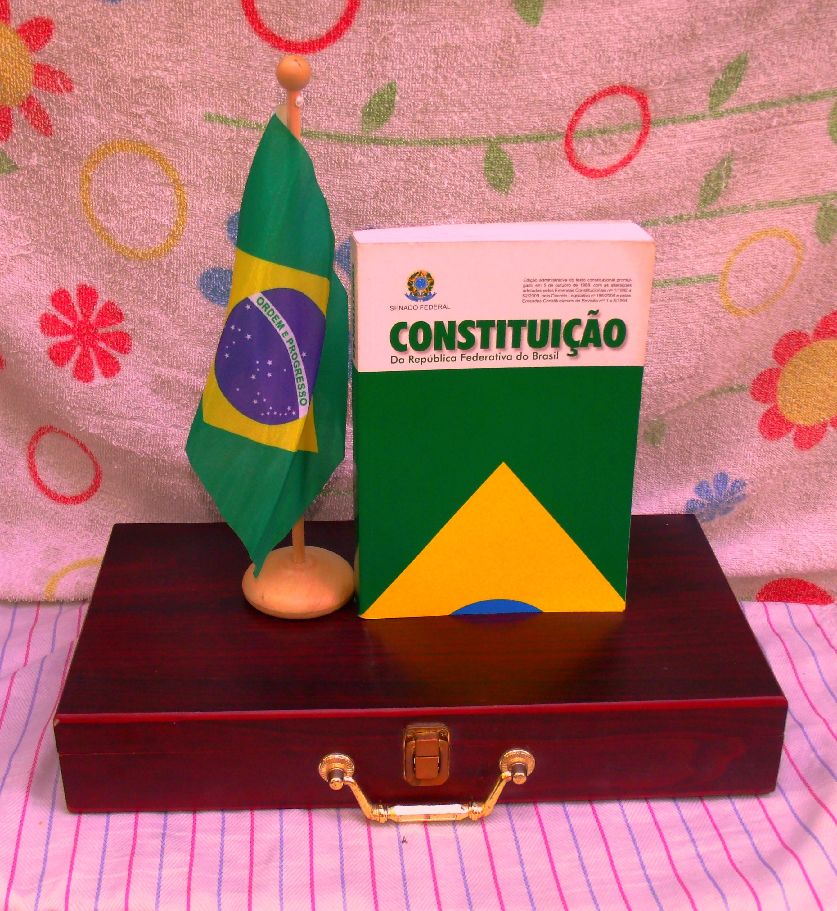 Imagem da Constituição e da bandeira do Brasil.